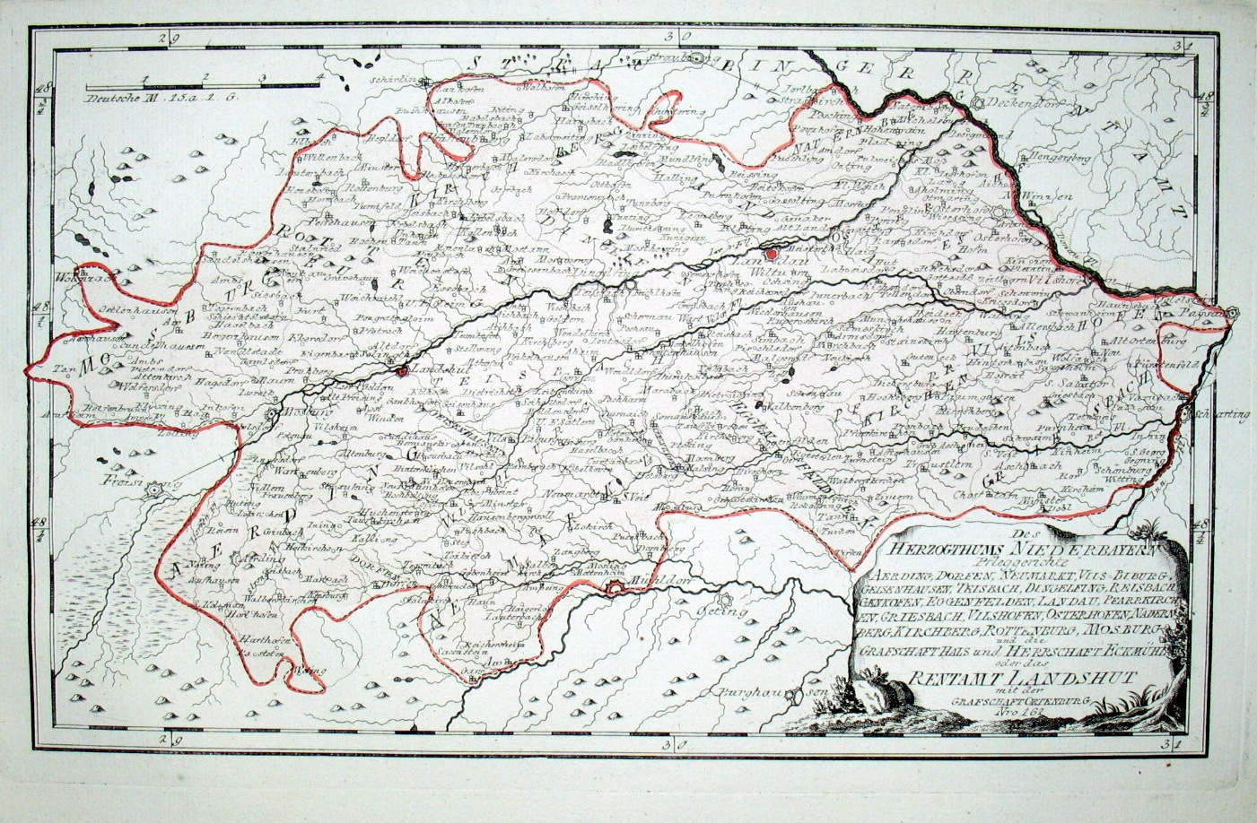 Des Herzogthums Niederbayern Pfleggerichte Aerding, Dorfen, Neumarkt, Vils-Biburg, Geisenhausen, Teisbach, Dingelfing, Reisbach Gaenkofen, Eggenfelden, Landau, Pfarrkirchen, Griesbach, Vilshofen, Osterhofen, Nadernberg, Kirchberg, Rottenburg, Mosburg und die Grafschaft Hals und Herrschaft Eckmühl oder das Rentamt Landshut mit der Grafschaft Ortenburg. Nro. 162. Kolorierter Kupferstich